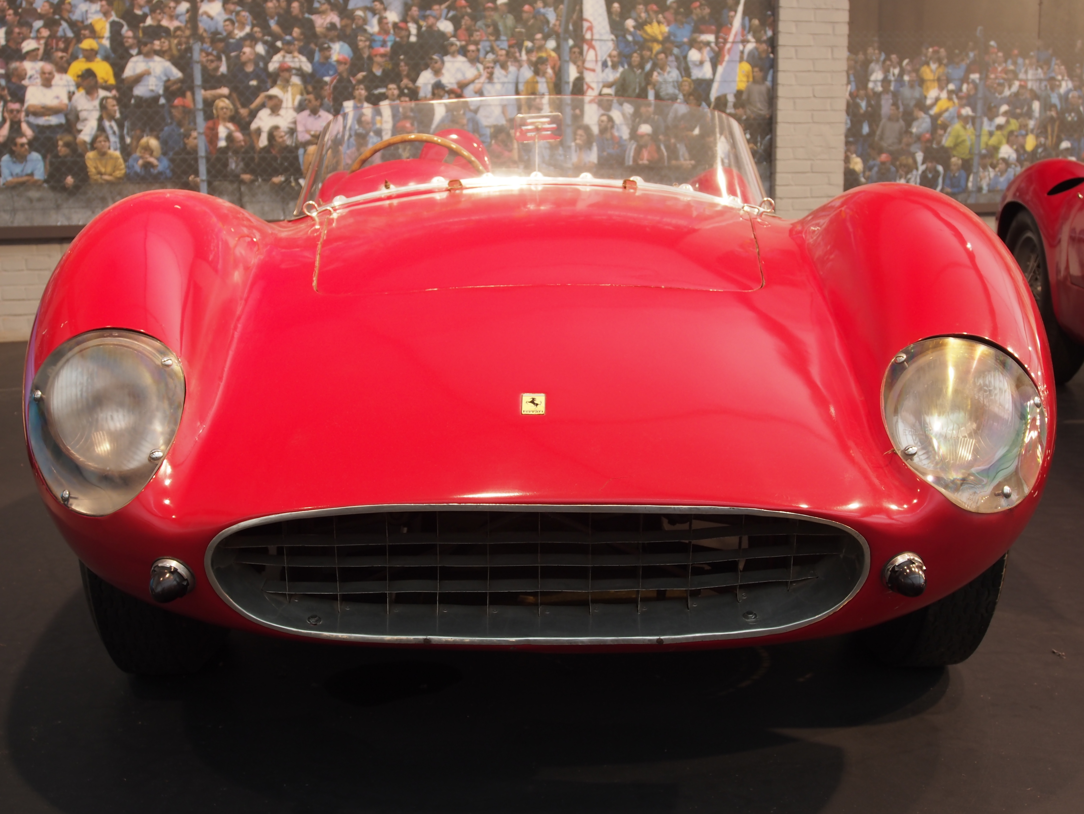 Photographed at the Cité de l’Automobile, Musée national de l’automobile, Collection Schlumpf, Mulhouse, France.